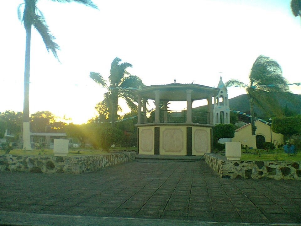 Plaza y Capilla de Nuestra Señora del Perpetuo Socorro, Moreno de Bravo, Ecuandureo, Michoacan